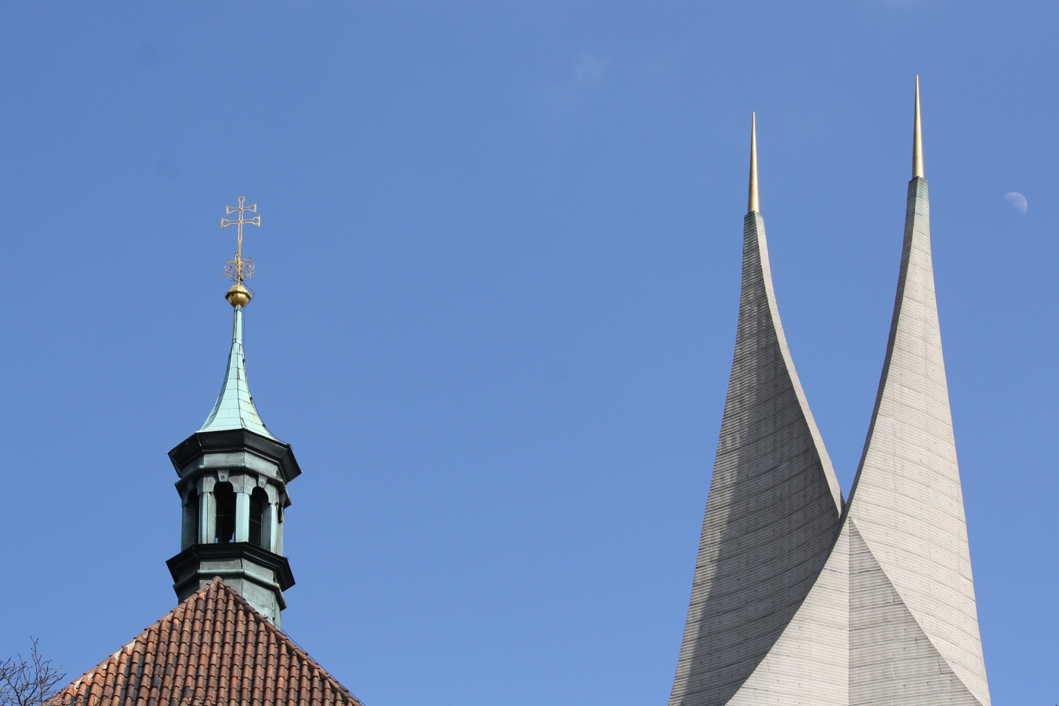 Střechy kostelů Emauzského kláštera